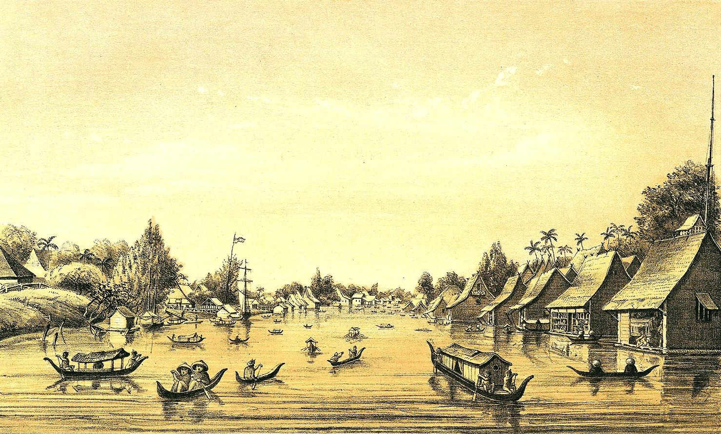 C.A.L.M. Schwaner, Borneo. Ansicht der Stadt Bandjermassin